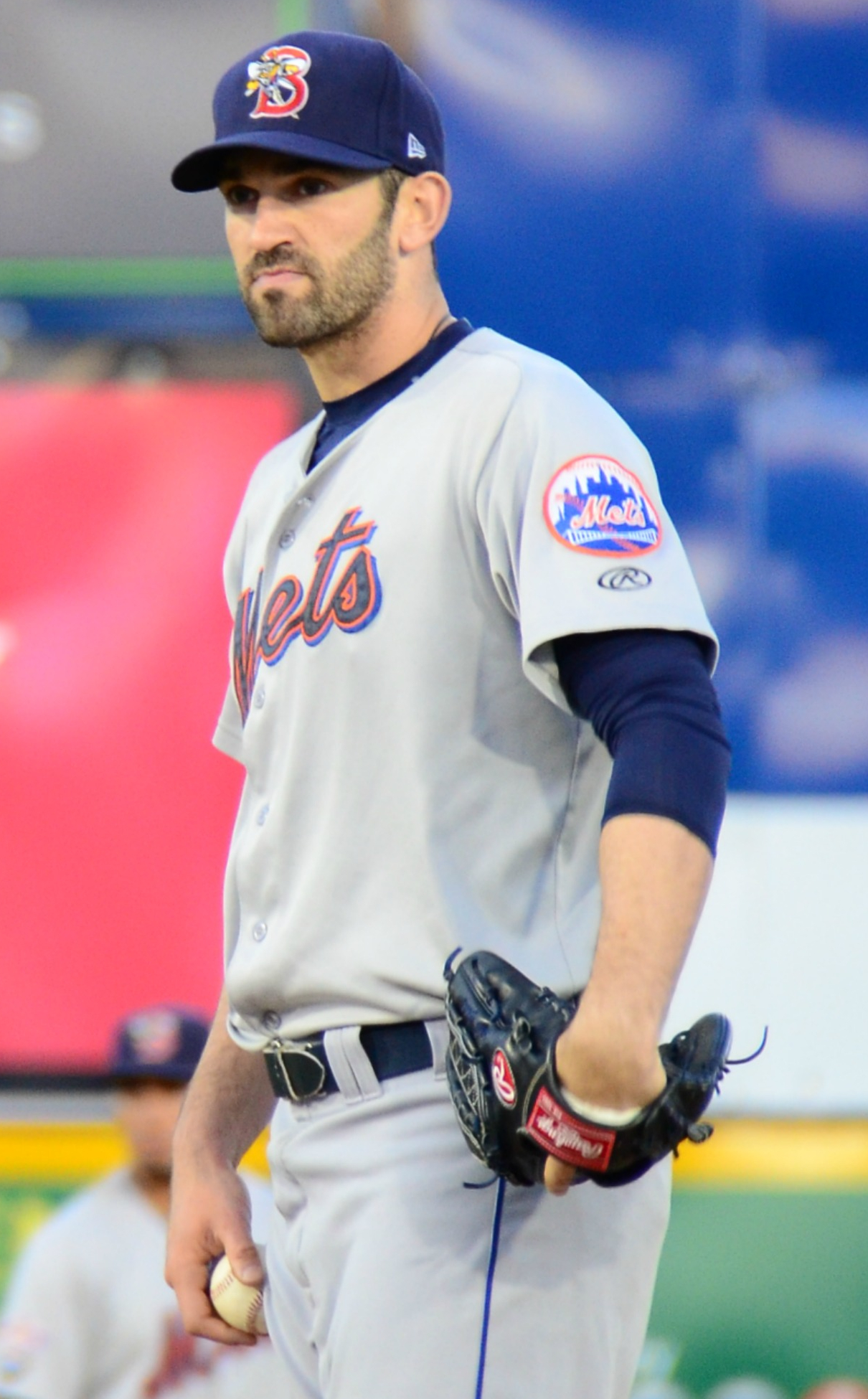 Josh Zeid